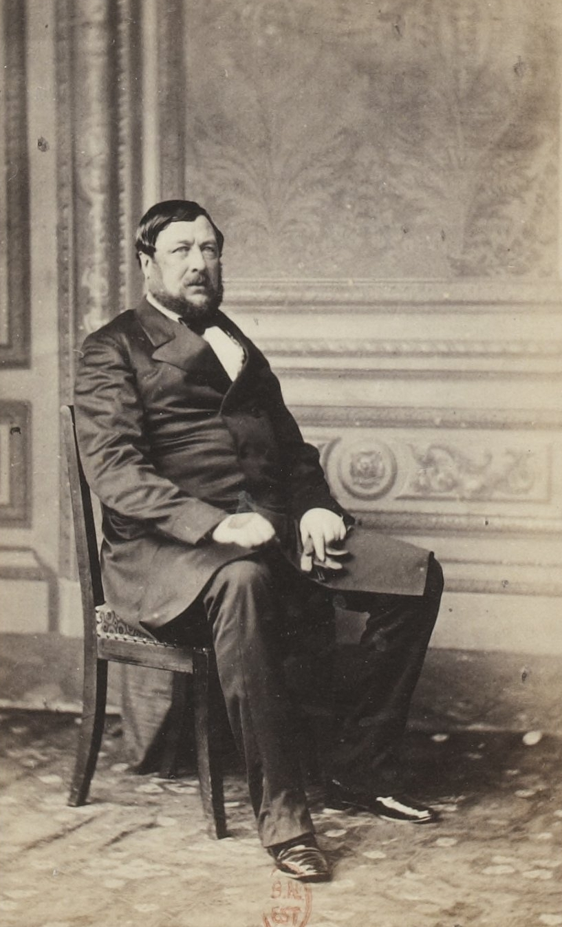 Album des députés au Corps législatif entre 1852-1857.